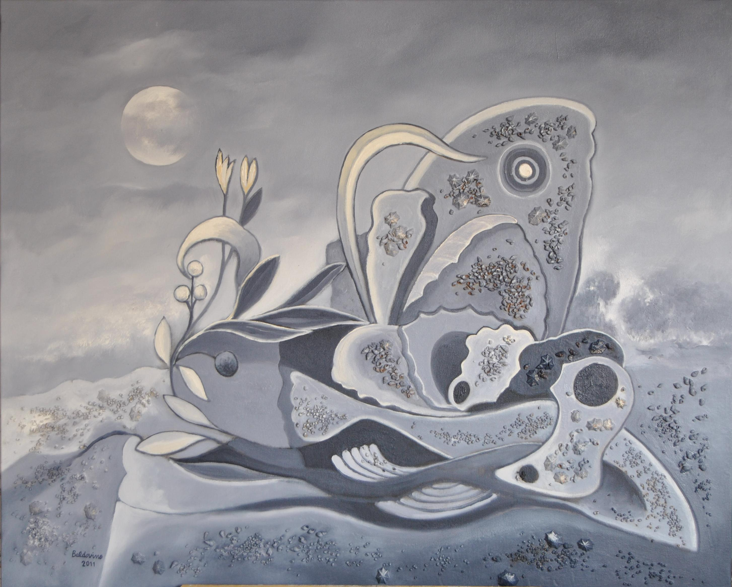 Ángel Baldovino.La Luna y los Caracoles.Óleo sobre tela.100x81